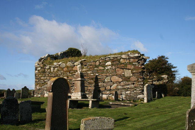 Kilchatton Church